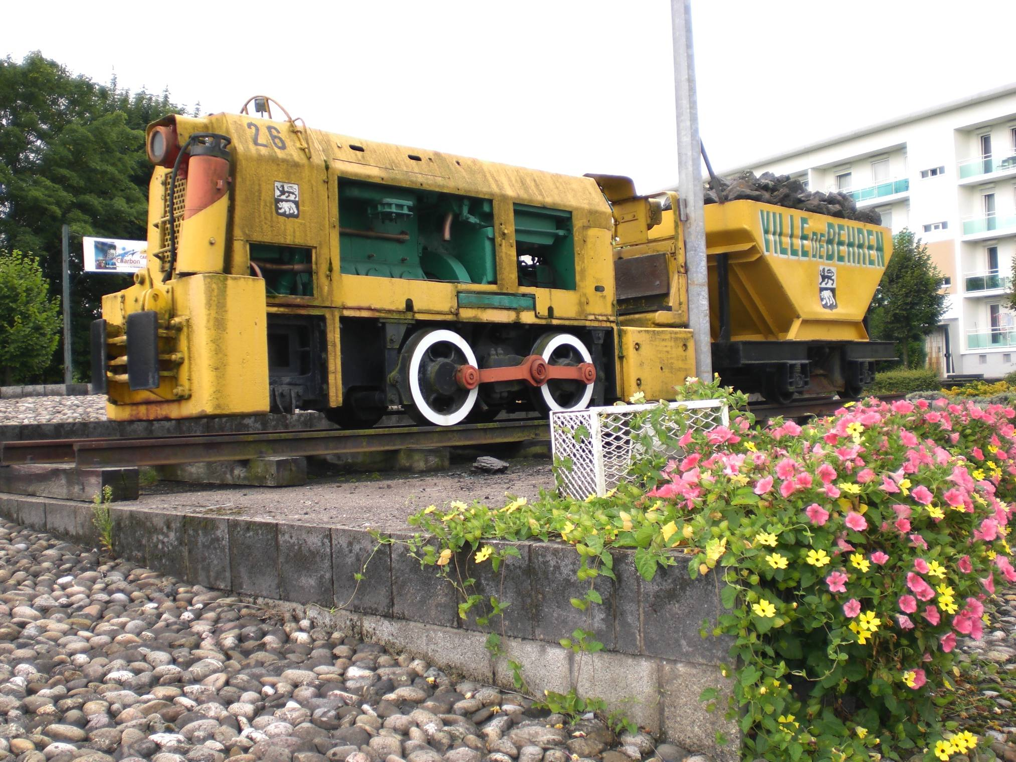 Grubenlok mit Kohlenwagen auf Verkehrskreisel in Behren-lès-Forbach, Frankreich